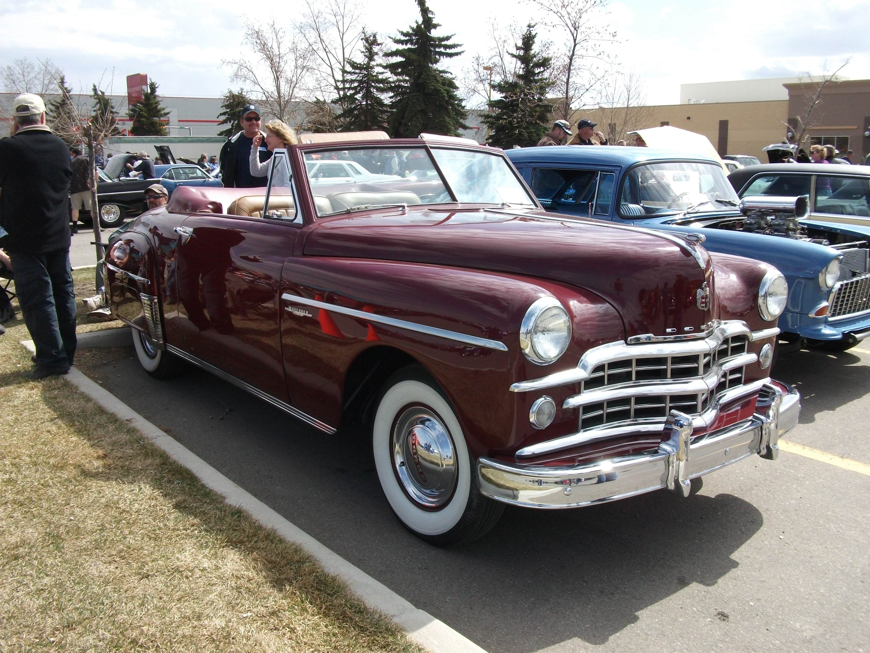 1949 Dodge Wayfarer Roadster